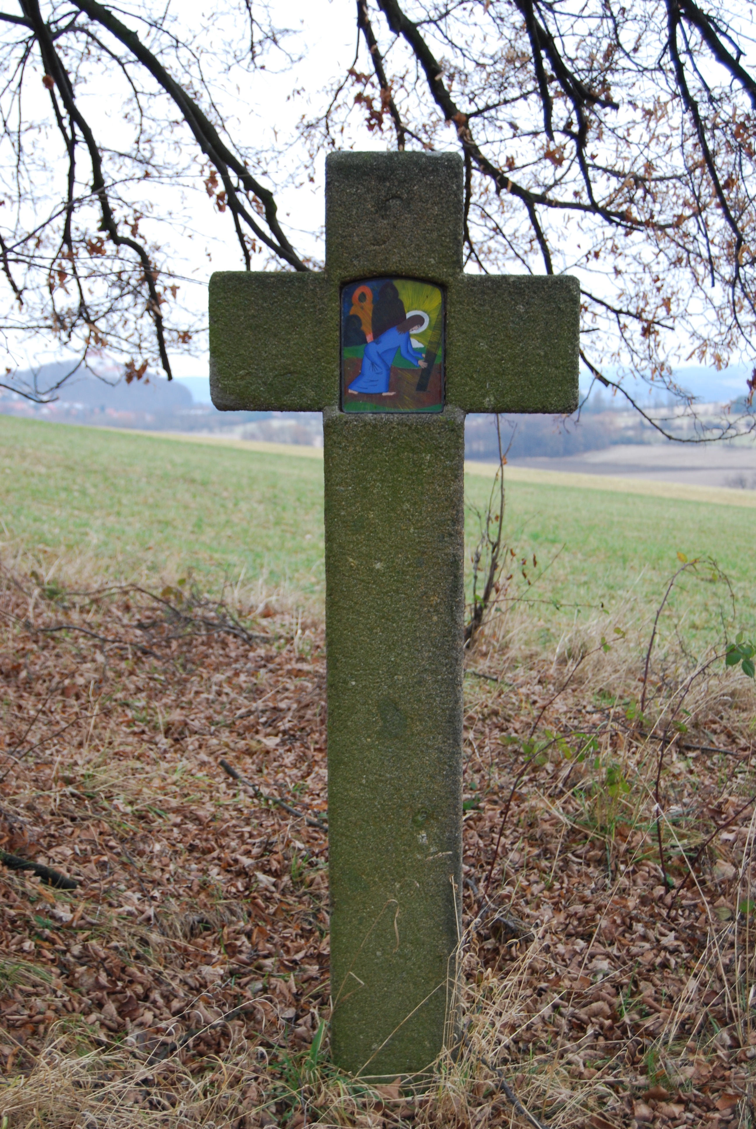 Jeden z křížů v Kalvárii na horu Radešín. Počepice. Okres Příbram. Česká republika.